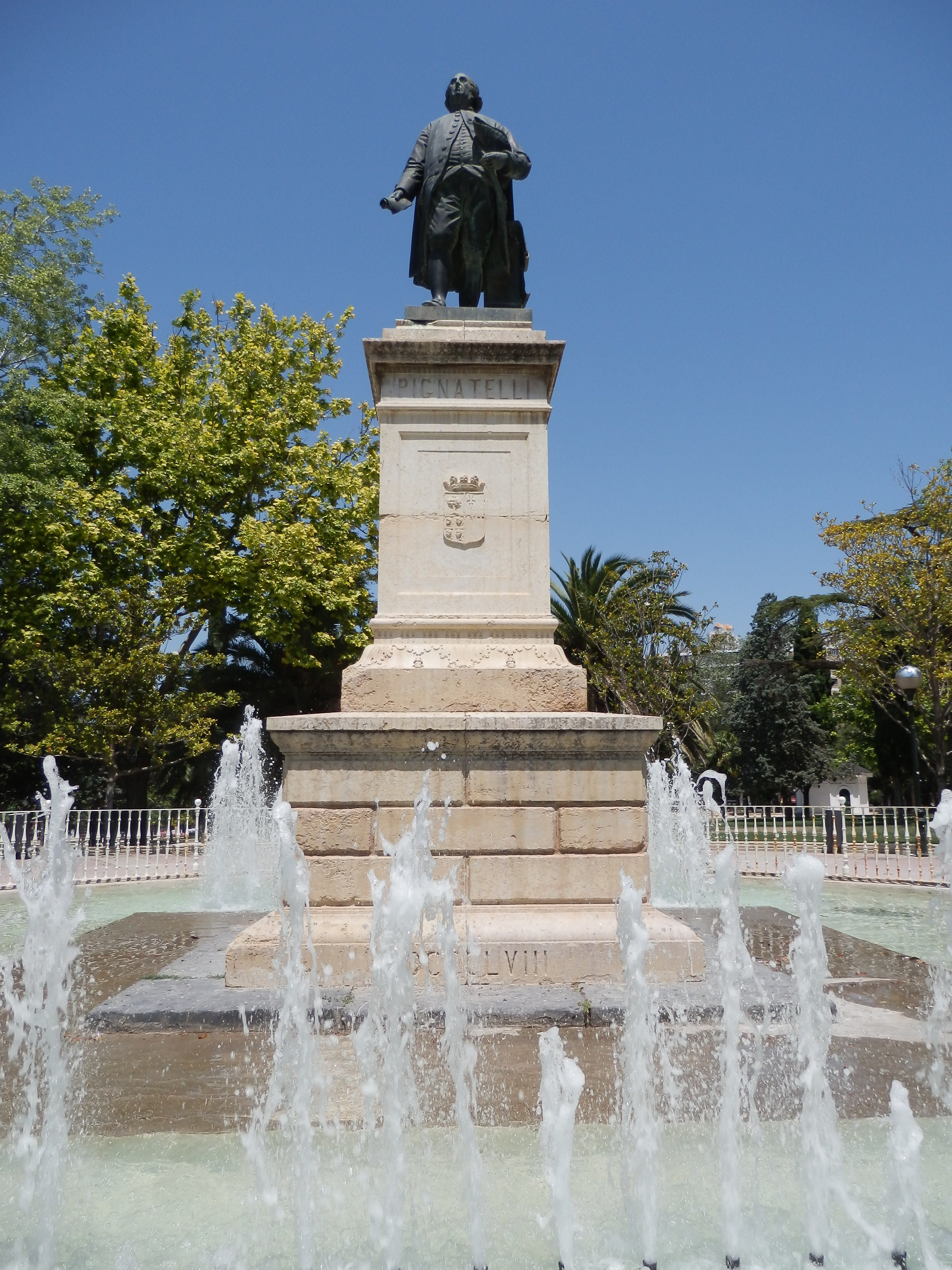 Monumento a Ramón Pignatelli situado en el Parque Pignatelli de Zaragoza, España. Escultura de Antonio Palao Marco